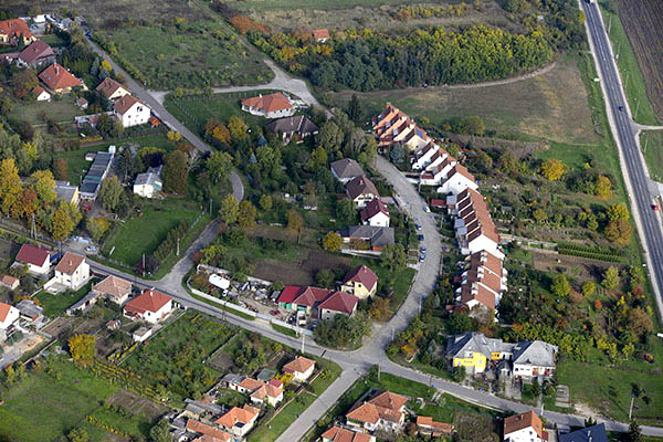 Emőd légi fotó